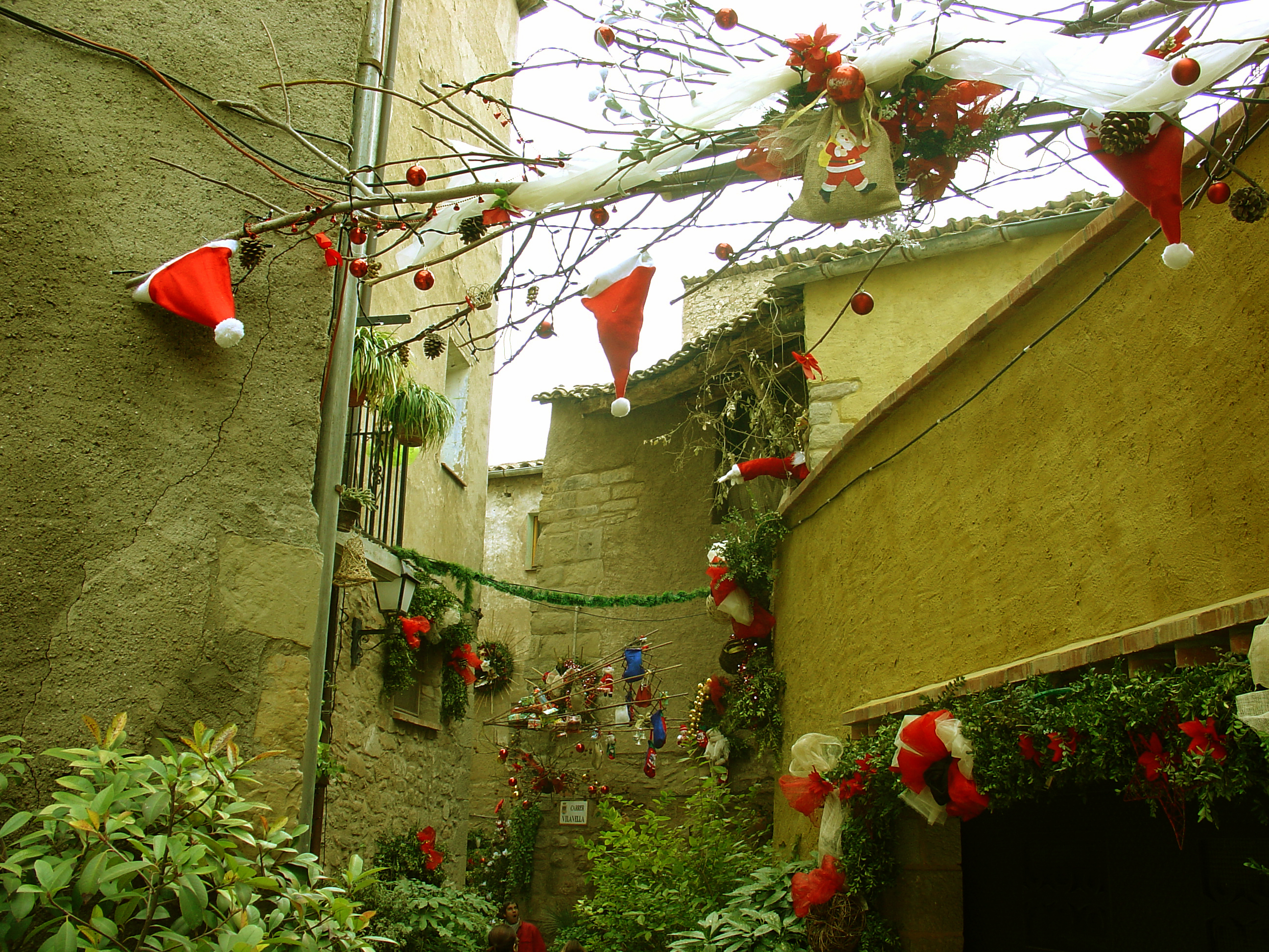 Torà (Lleida, Catalunya, Spain) in Xmas